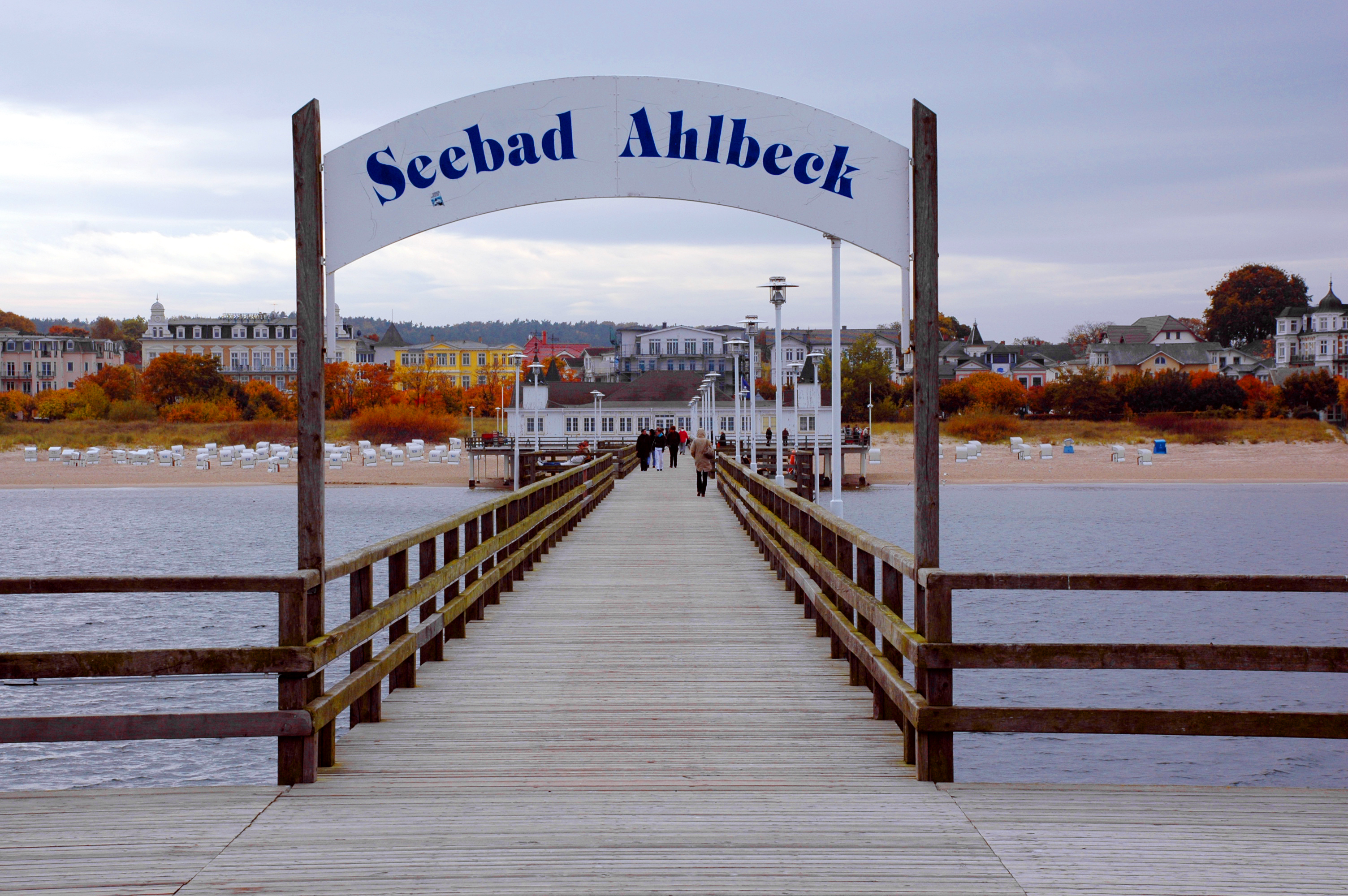 Ahlbeck, molo na plaży